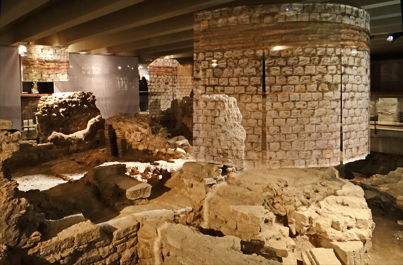 La nouvelle scénographie des thermes de la crypte archéologique Ces thermes de petites dimensions (175 m2) datent de l'époque du bas Empire romain, IVème siècle (360). La salle tiède des thermes (tepidarium) était, comme la salle chaude (laconicum), alimentée en chaleur par un système à hypocauste (chauffage par le sol). Quelques éléments de l'édifice, retrouvés lors des fouilles archéologiques (de 1965 à 1972), sont visibles (tepidarium, hypocauste,..) dans la crypte archéologique. La table tactile réalisée techniquement par Dassault Systèmes est placée à proximité, elle facilite la compréhension de la disposition des salles des thermes et leurs fonctions, elle incorpore des personnages animés en situation et en transparence derrière les murs. La nouvelle scénographie permet de mieux distinguer qu'auparavant les parties romaines des parties médiévales des fouilles. Ces dispositifs scénographiques sont particulièrement efficaces et bien conçus, ils constituent des aides appréciables à la visite. Site de la Crypte archéologique du Parvis Notre-Dame (musée de la ville de Paris) Paris en 3D (Dassault Systèmes) La Crypte archéologique du parvis Notre-Dame fait peau neuve. Une nouvelle exposition consacrée à l’histoire de Paris invite les visiteurs à (re)découvrir les vestiges préservés dans la Crypte et à les replacer dans le contexte architectural et historique de leur époque. A l’occasion de cette exposition, pour la première fois depuis son ouverture au public en 1980, la muséographie de la Crypte a également été entièrement rénovée. extrait du site officiel